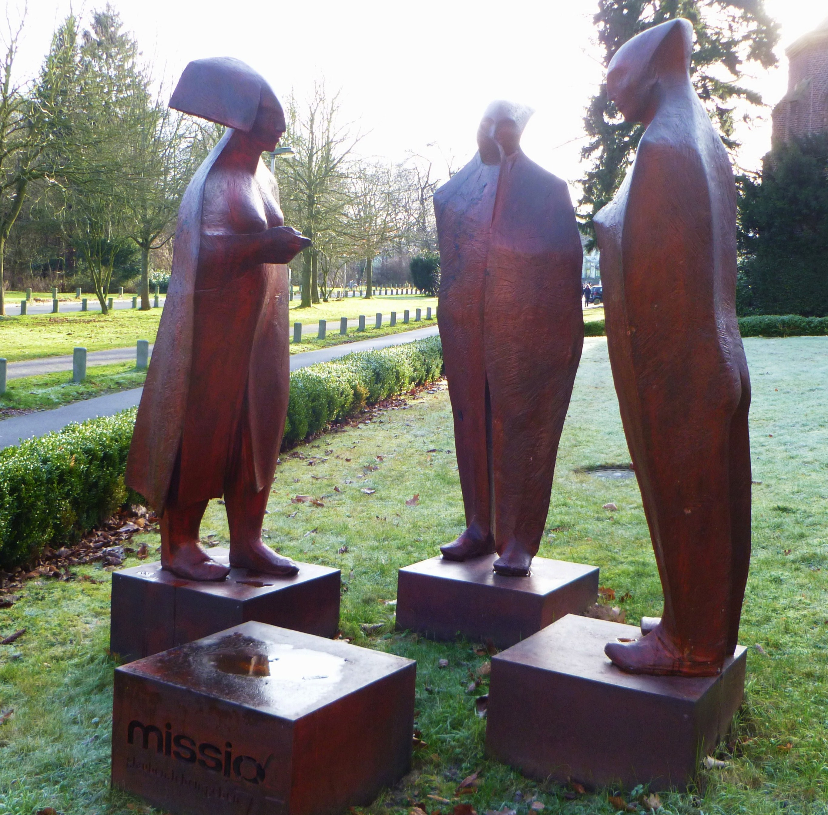 Großplastik von Wilhelm Senoner, 2011, Vorplatz zum Missio-Gebäude Aachen